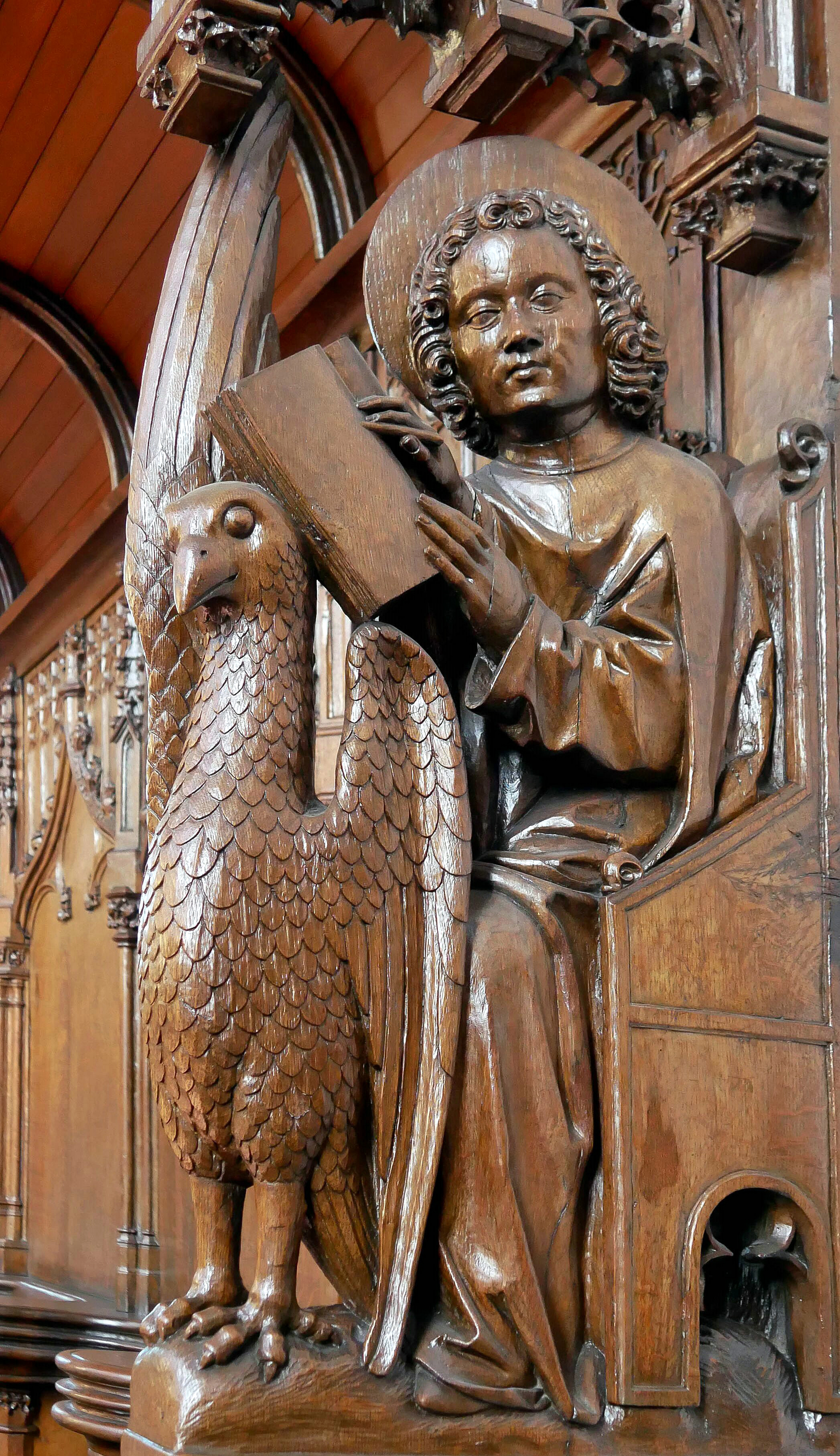 Chorgestühl, Evangelist Johannes mit Adler